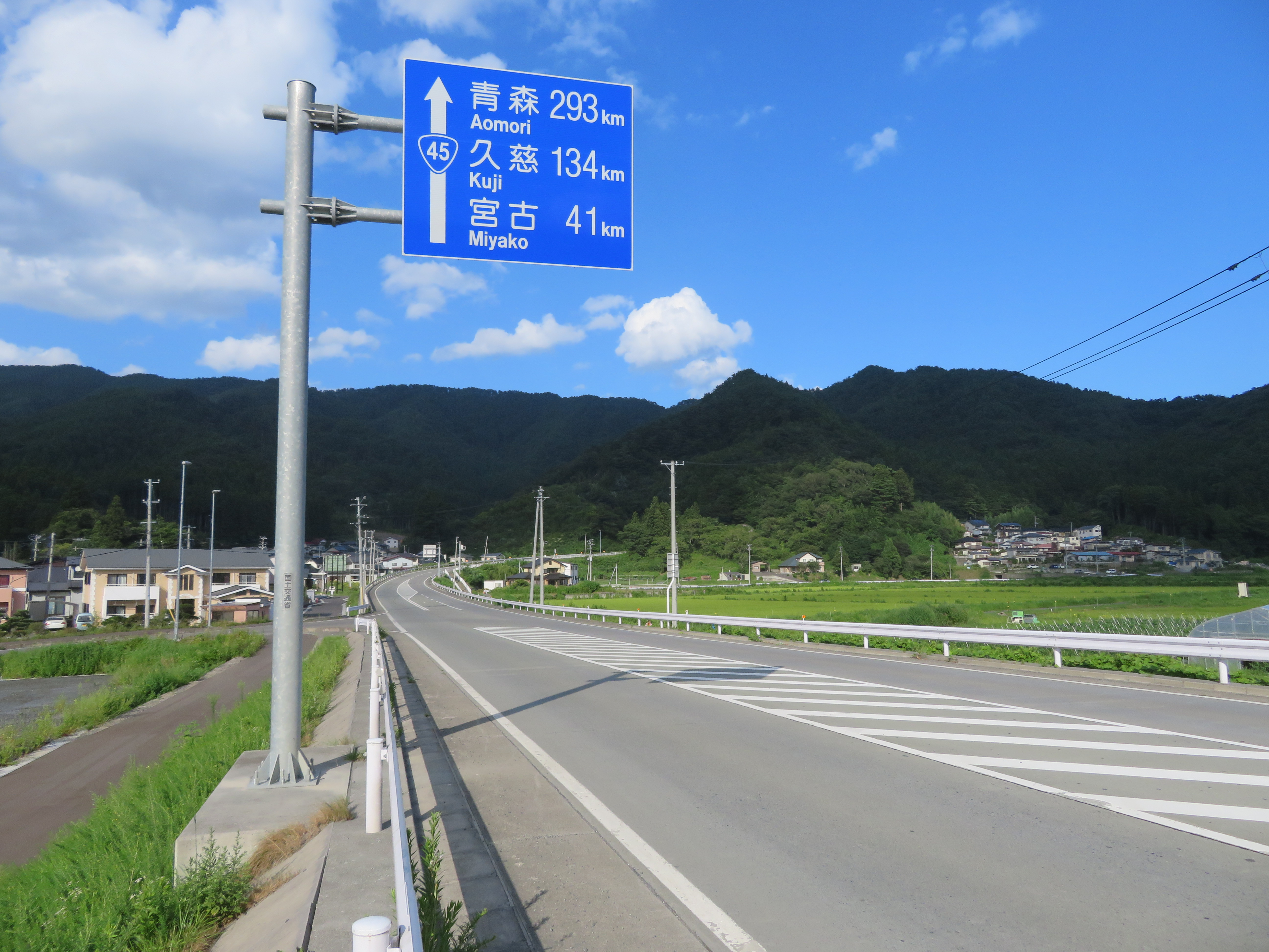 国道45号線大槌バイパス岩手県上閉伊郡大槌町大槌付近（山田町方面を撮影） Canon PowerShot SX720 HS